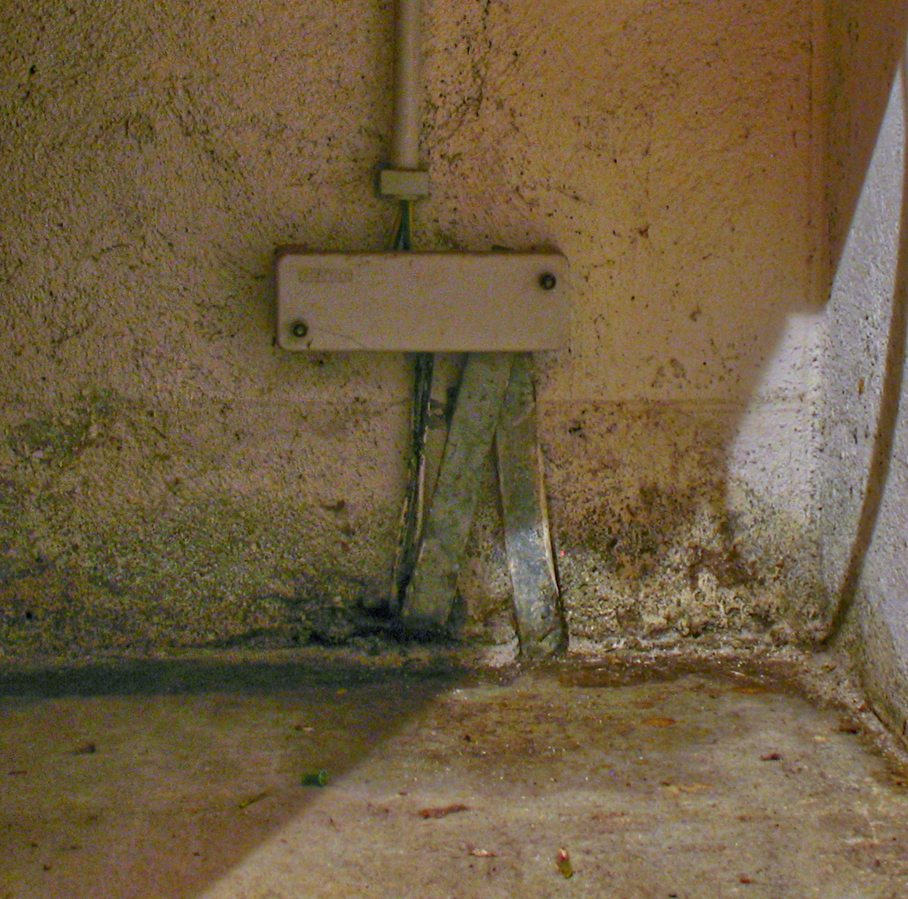 Fundamenterder